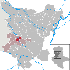 Ummendorf in Saxony-Anhalt (Country) - District (Landkreis) Börde